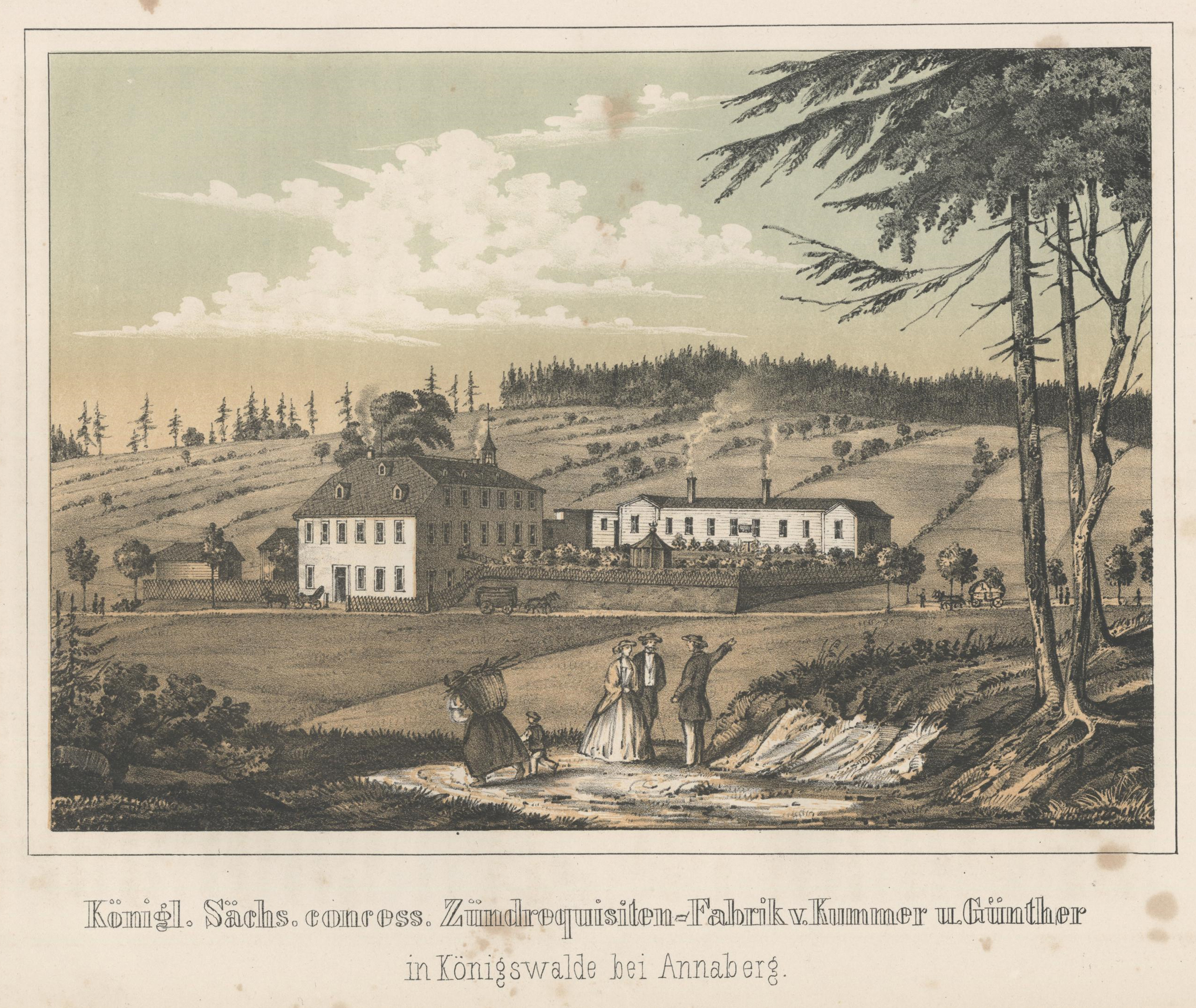 Königl. Sächs. concess. Zündrequisiten-Fabrik von Kummer und Günther in Königswalde bei Annaberg aus: Album der Sächsischen Industrie Erster Band